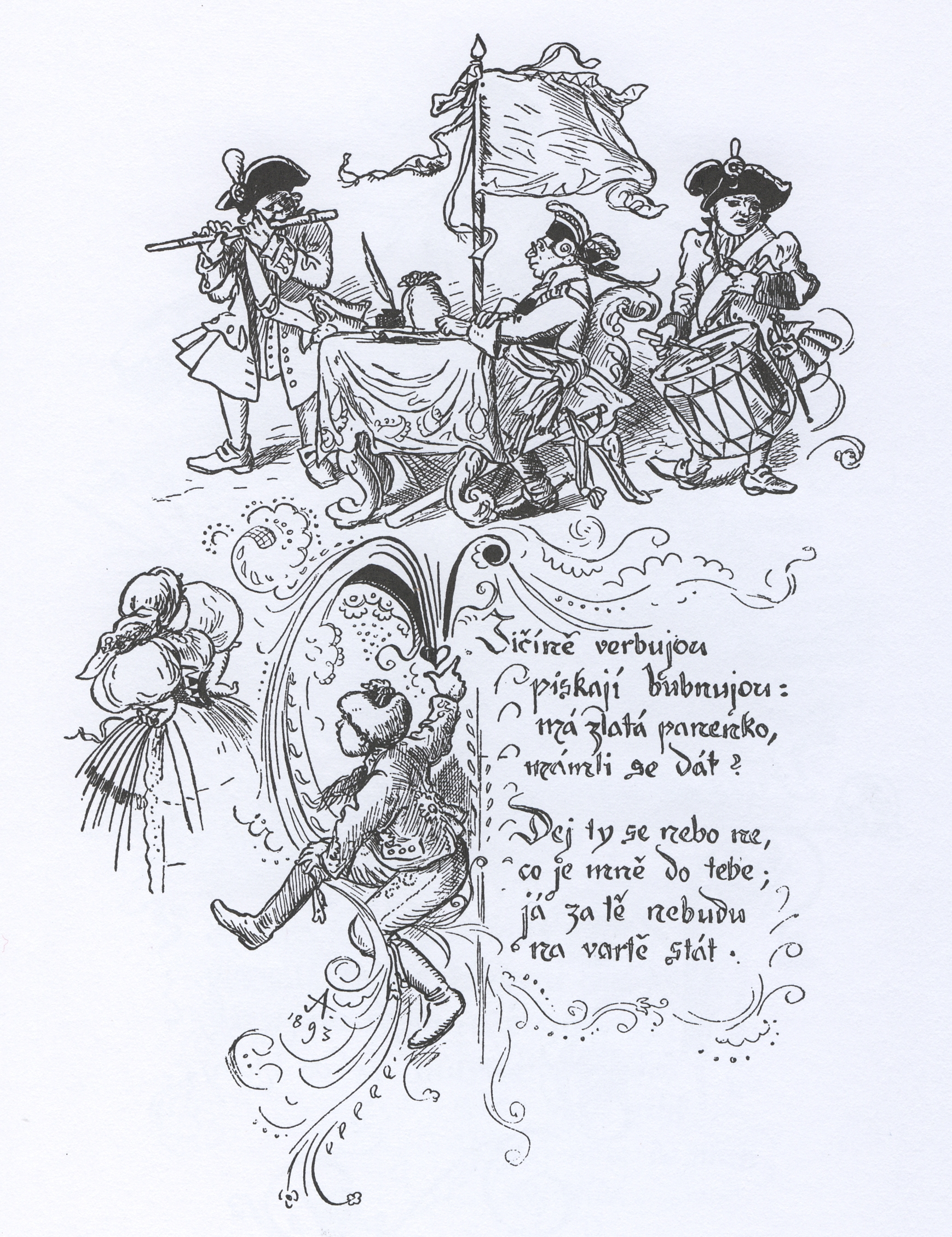 Mikoláš Aleš: Špalíček národních písní a říkadel